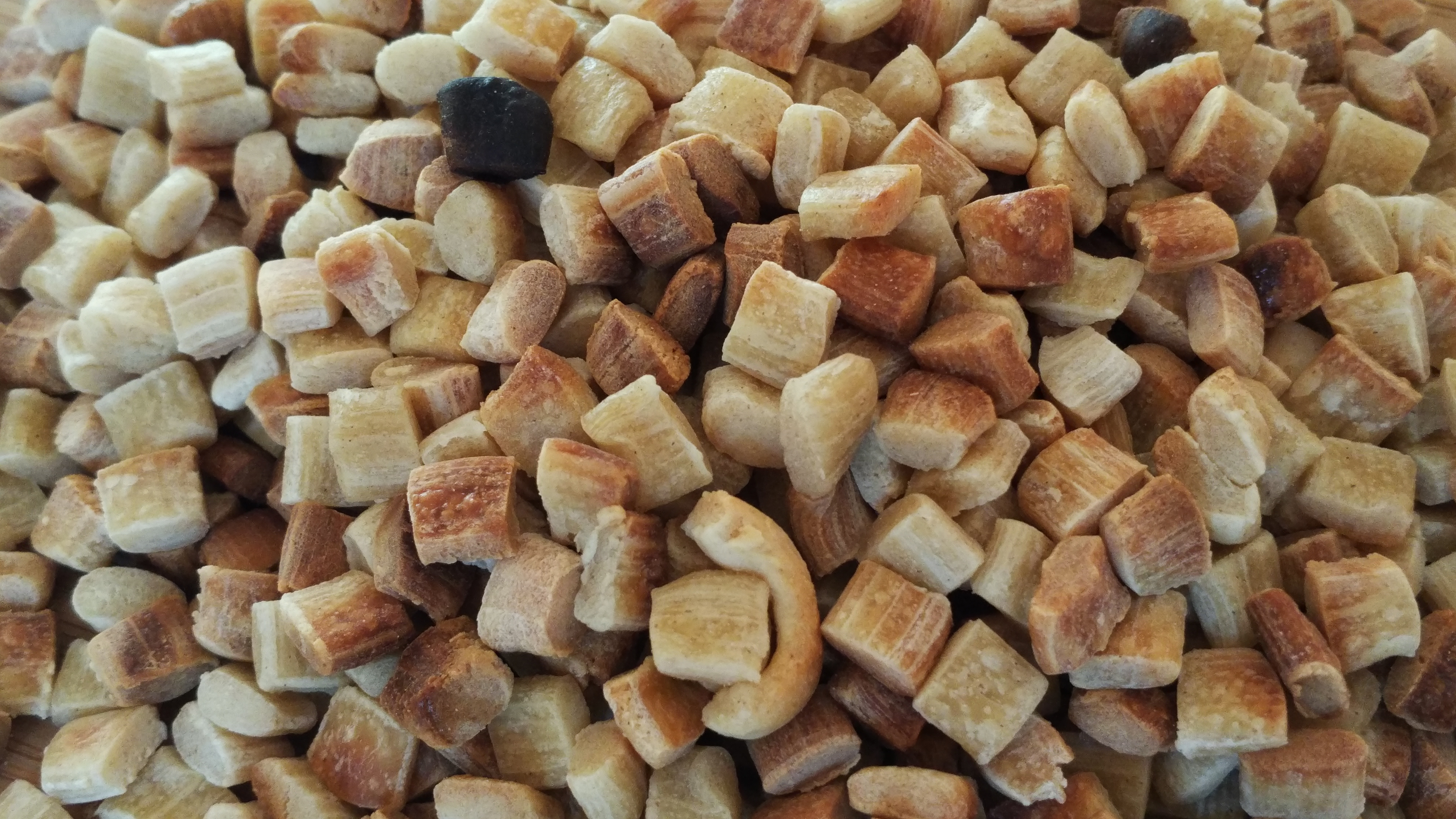 ferfel pasta